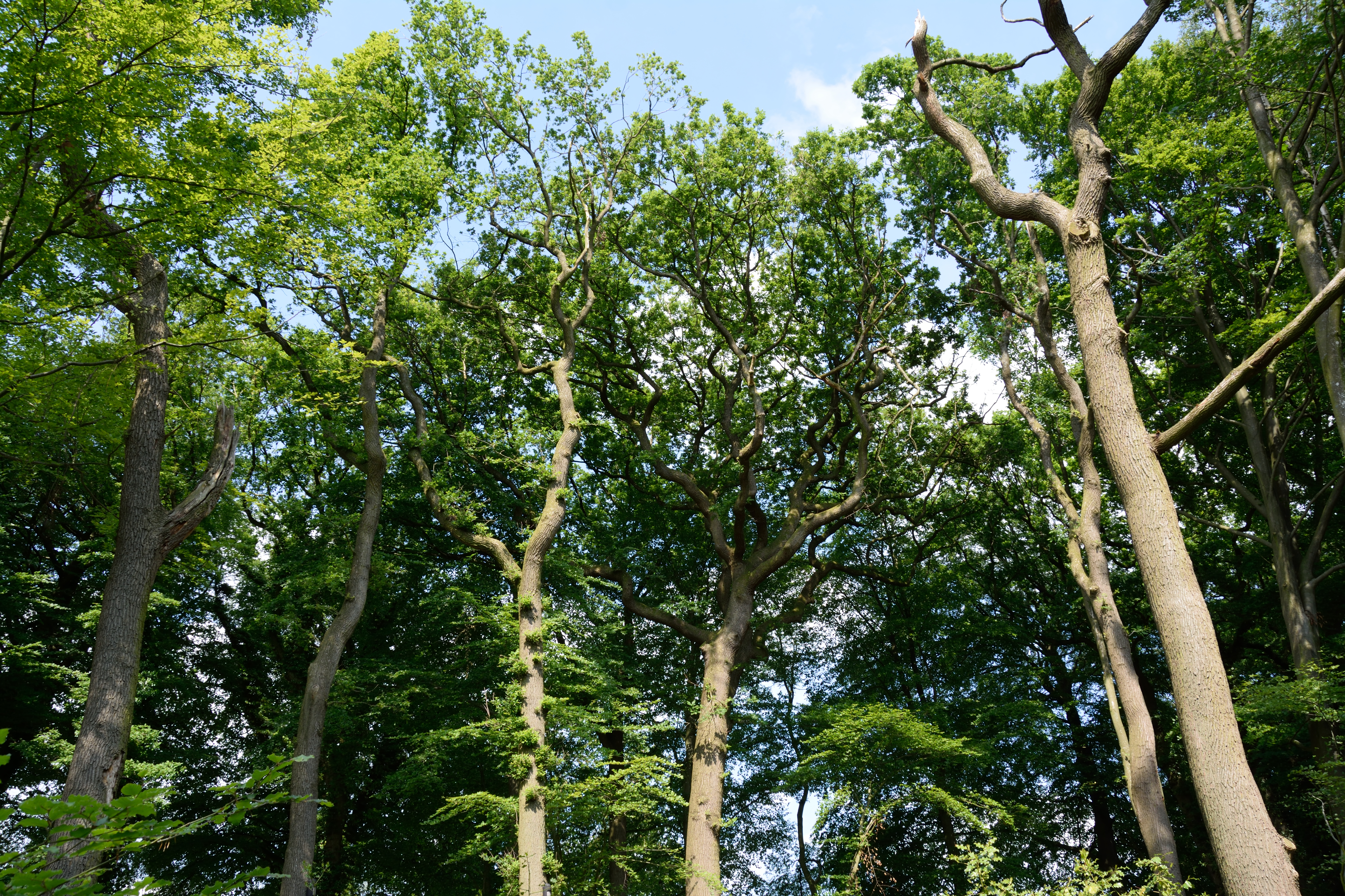 Der Kreis Steinburg hat mehrere Flächen unter dem gemeinsamen Namen "Landschaftsbestandteile und Landschaftsteile im Bereich mehrerer Gemeinden" zusammengefasst. Dieses Foto wurde in der Waldfläche „Hackstruck“ in Itzehoe aufgenommen, es ist das Teilstück Nr. 4.